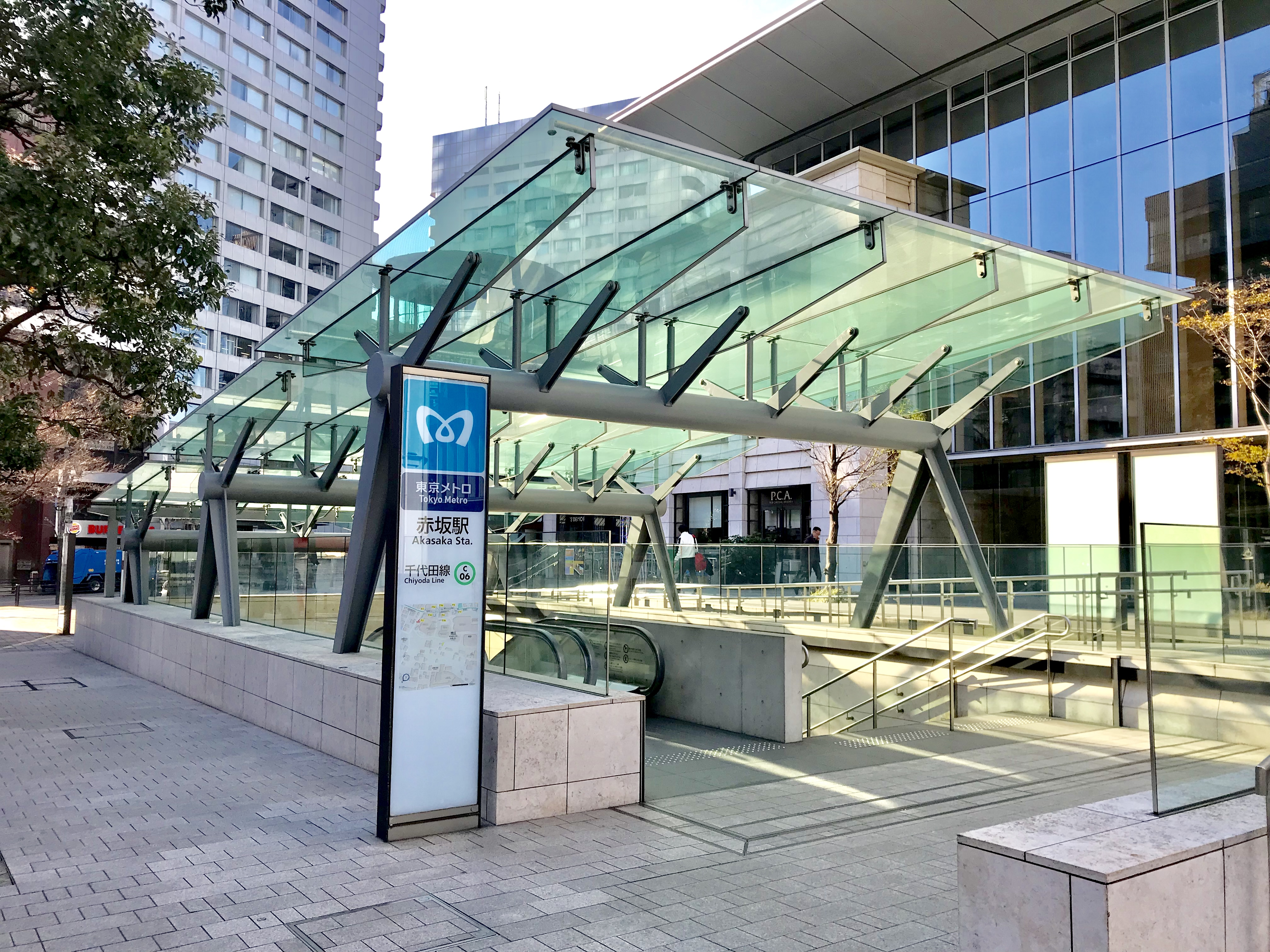 東京メトロ千代田線赤坂駅1番出入口